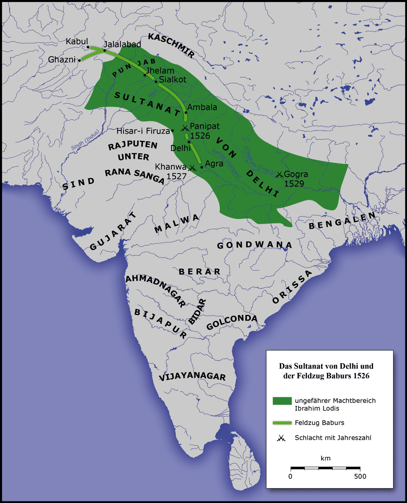 Karte: Das Sultanat von Delhi unter Ibrahim II. Lodi und der Feldzug Baburs 1526